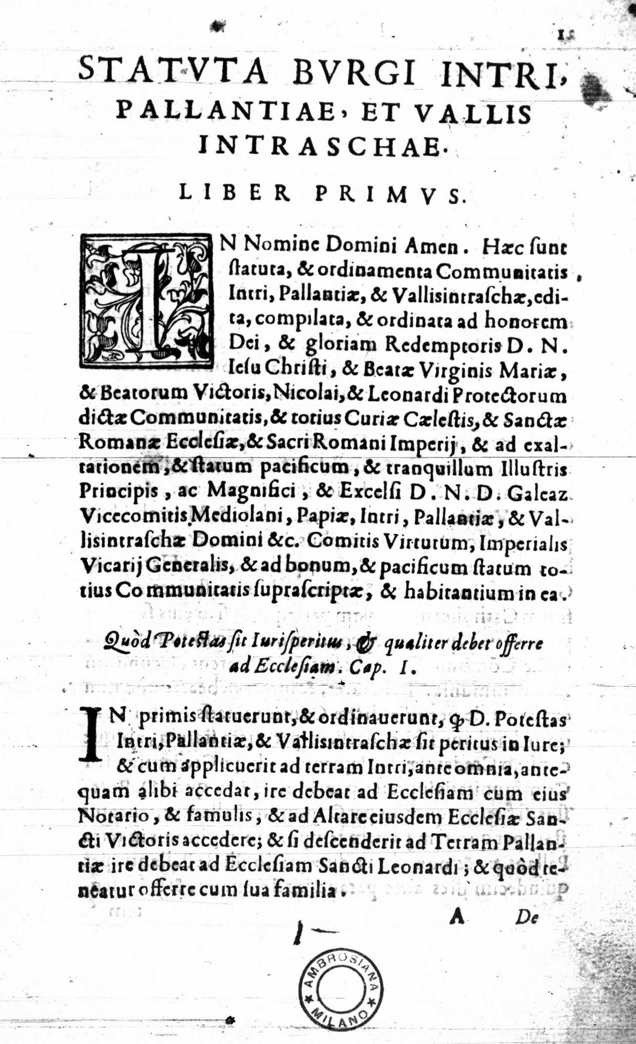 Frontespizio